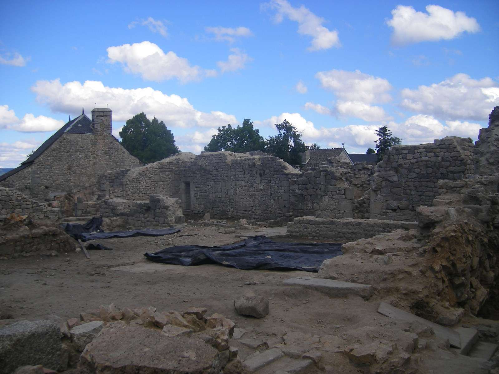 Apcher (commune Prunières) - archeological site